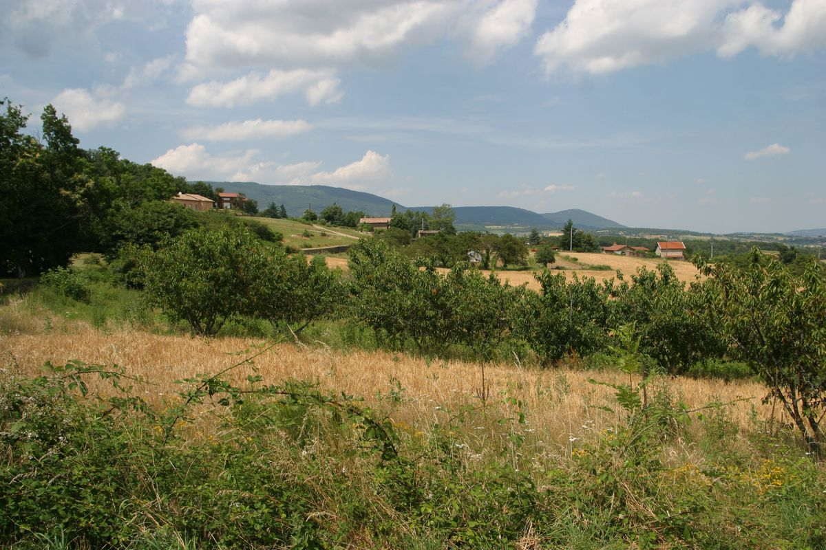 Agriculture diversifiée, un patchwork à préserver